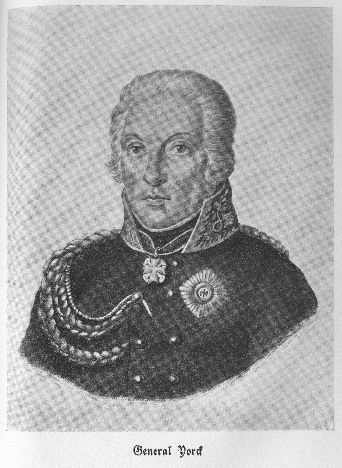 Stich des Generals Yorck um 1812